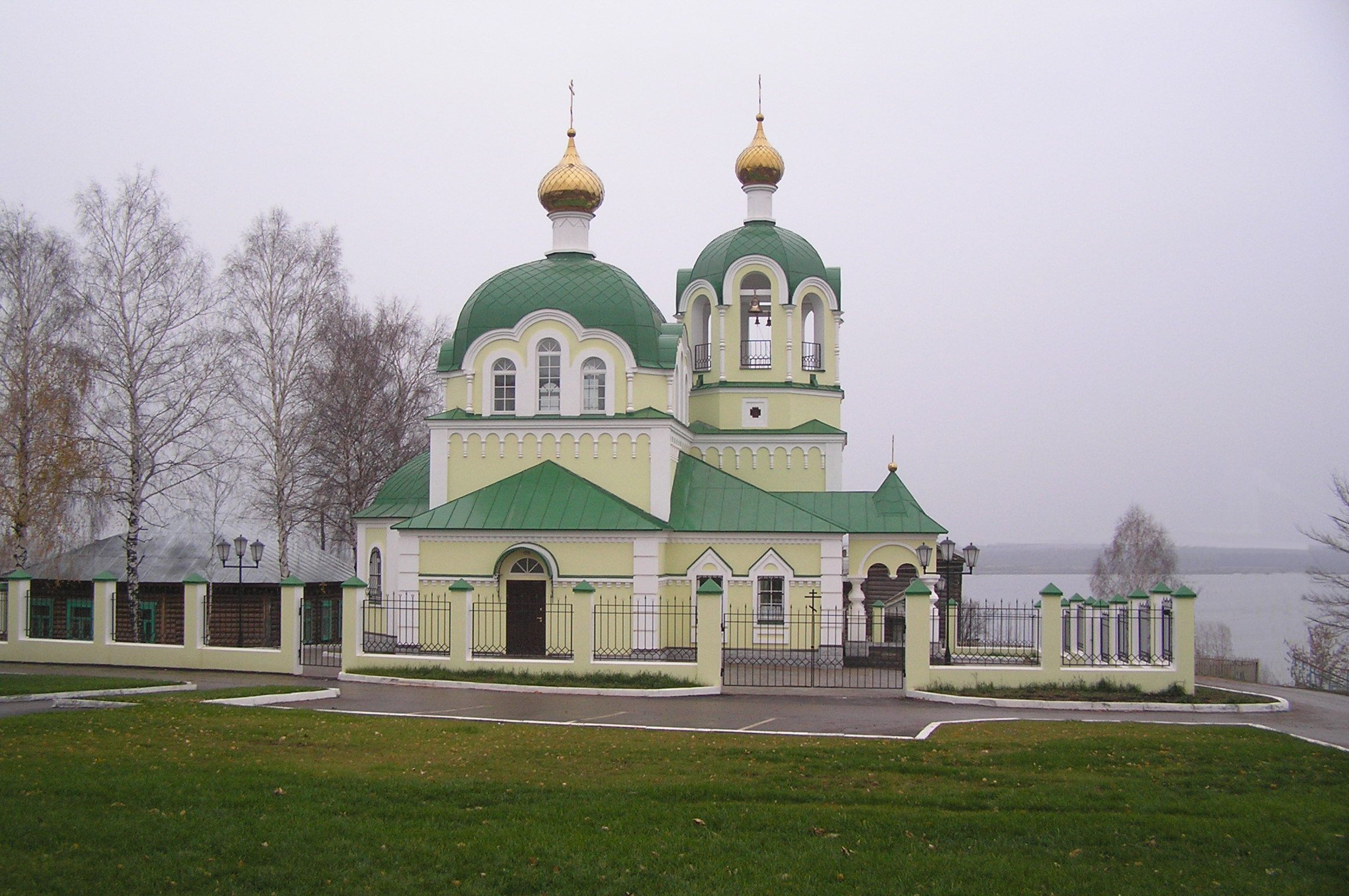 Церковь в с. Каракулино